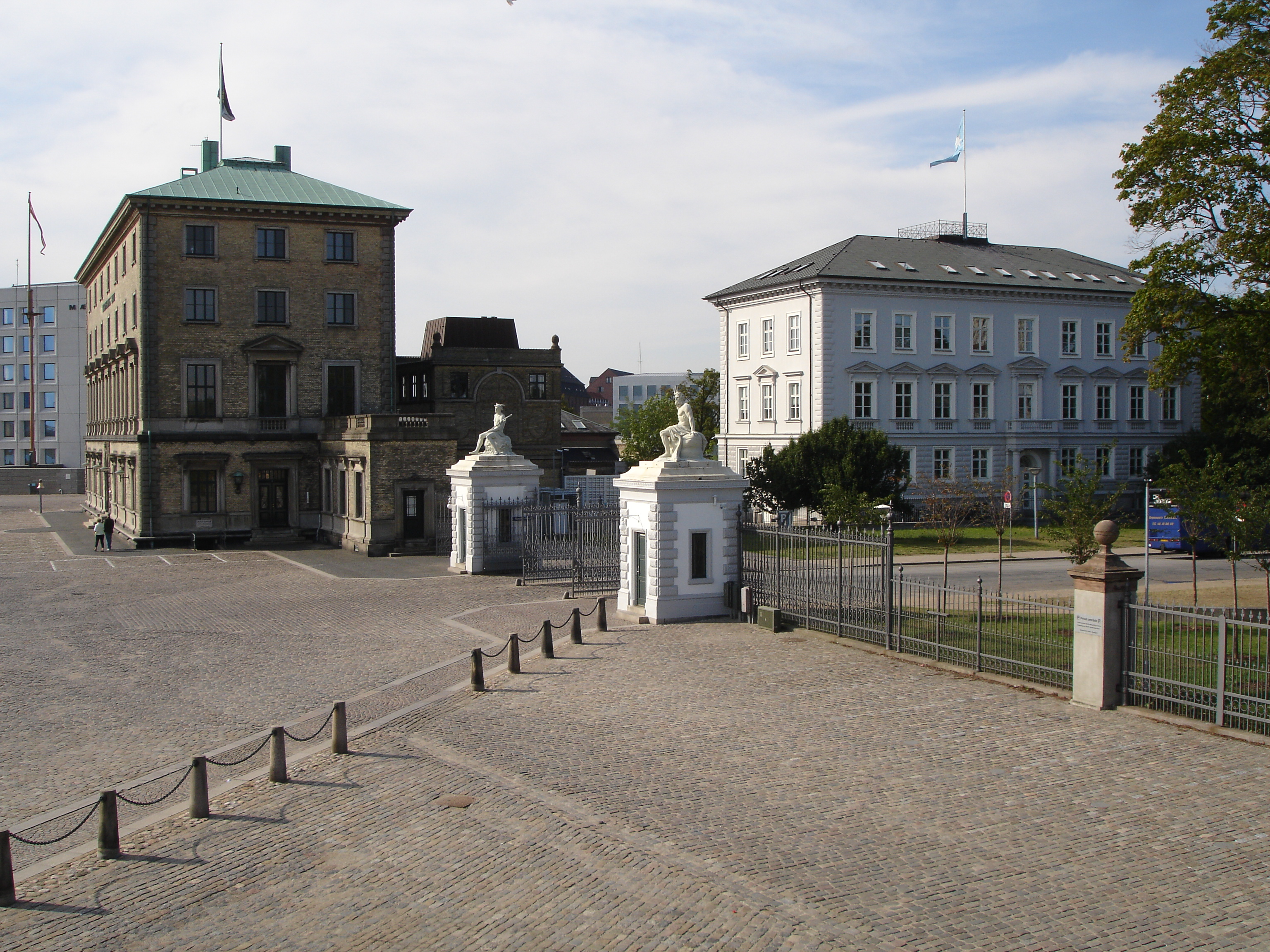 Nordre Yoldbod - Gate